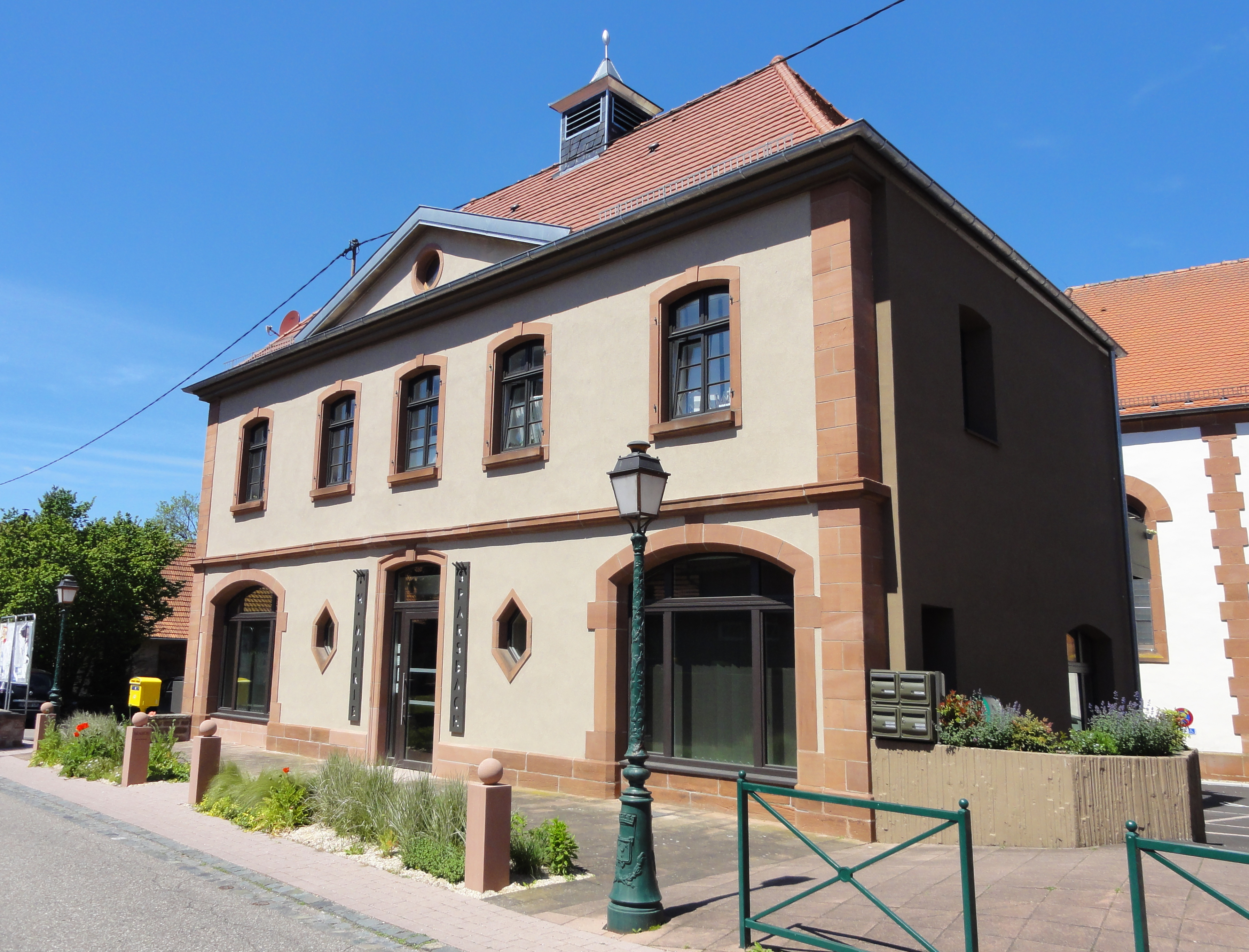 Alsace, Bas-Rhin, Sparsbach, Mairie (XIXe), 6 rue des Vosges-du-Nord. .